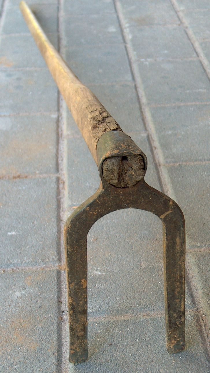 Karst